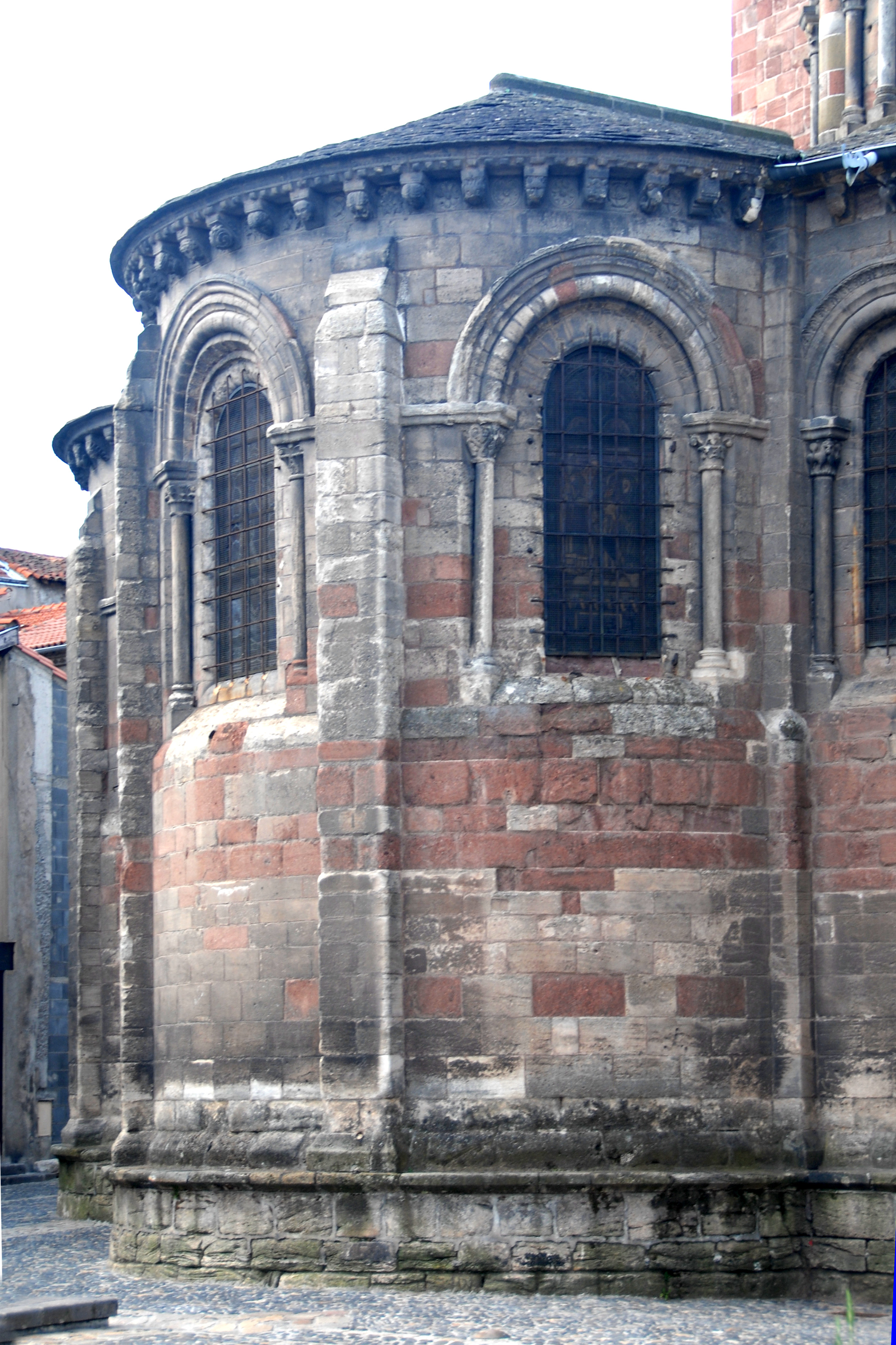 St.-Julien Brioude, Scheitelkapelle von NW